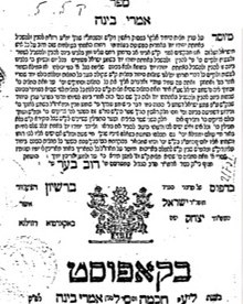 Imrei Binah title page. Kapust edition. Author: Rabbi Dovber Schneuri